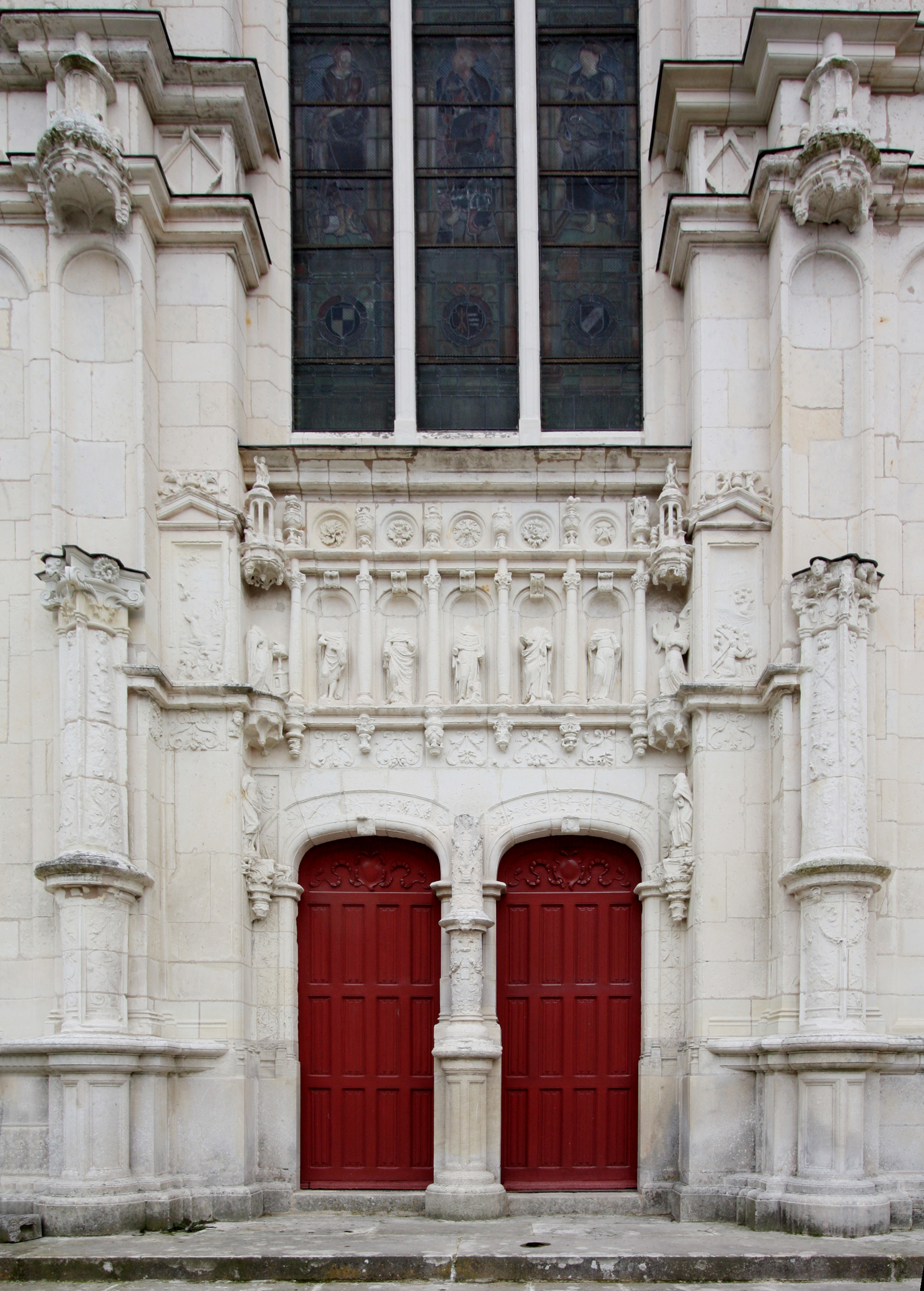 Portail occidental de la collégiale Saint-Jean-Baptiste de Montrésor.